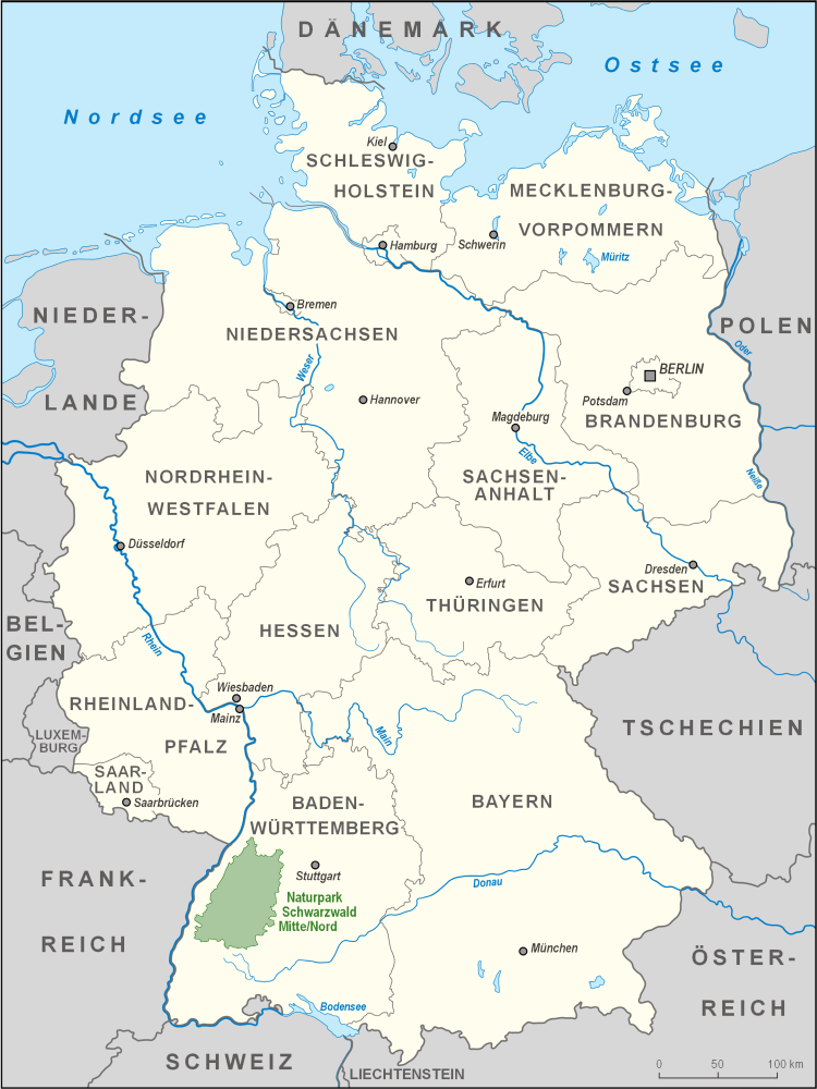 Karte des Naturparks Schwarzwald Mitte/Nord in Deutschland